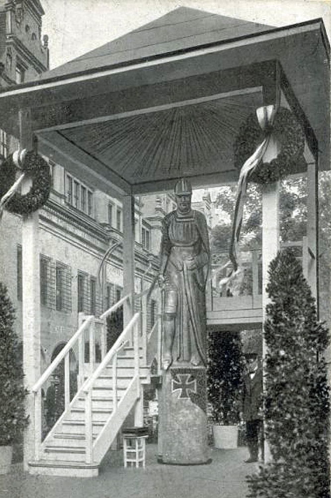 Die Statue Wehrmann in Eisen von Mathieu Molitor 1915 auf dem Naschmarkt in Leipzig